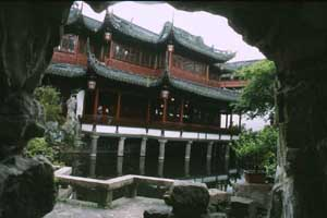 Im Yu-Garten in Shanghai